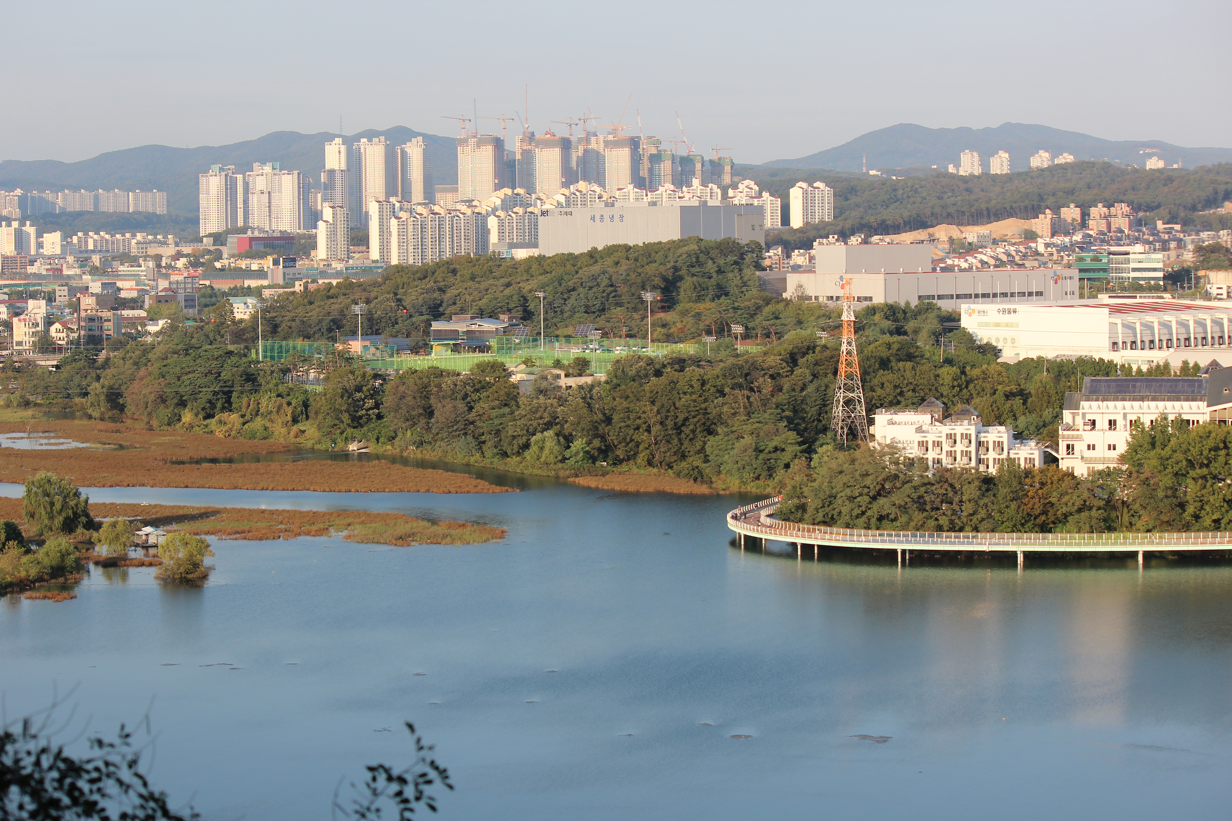 매미산에서본 기흥호수 전경